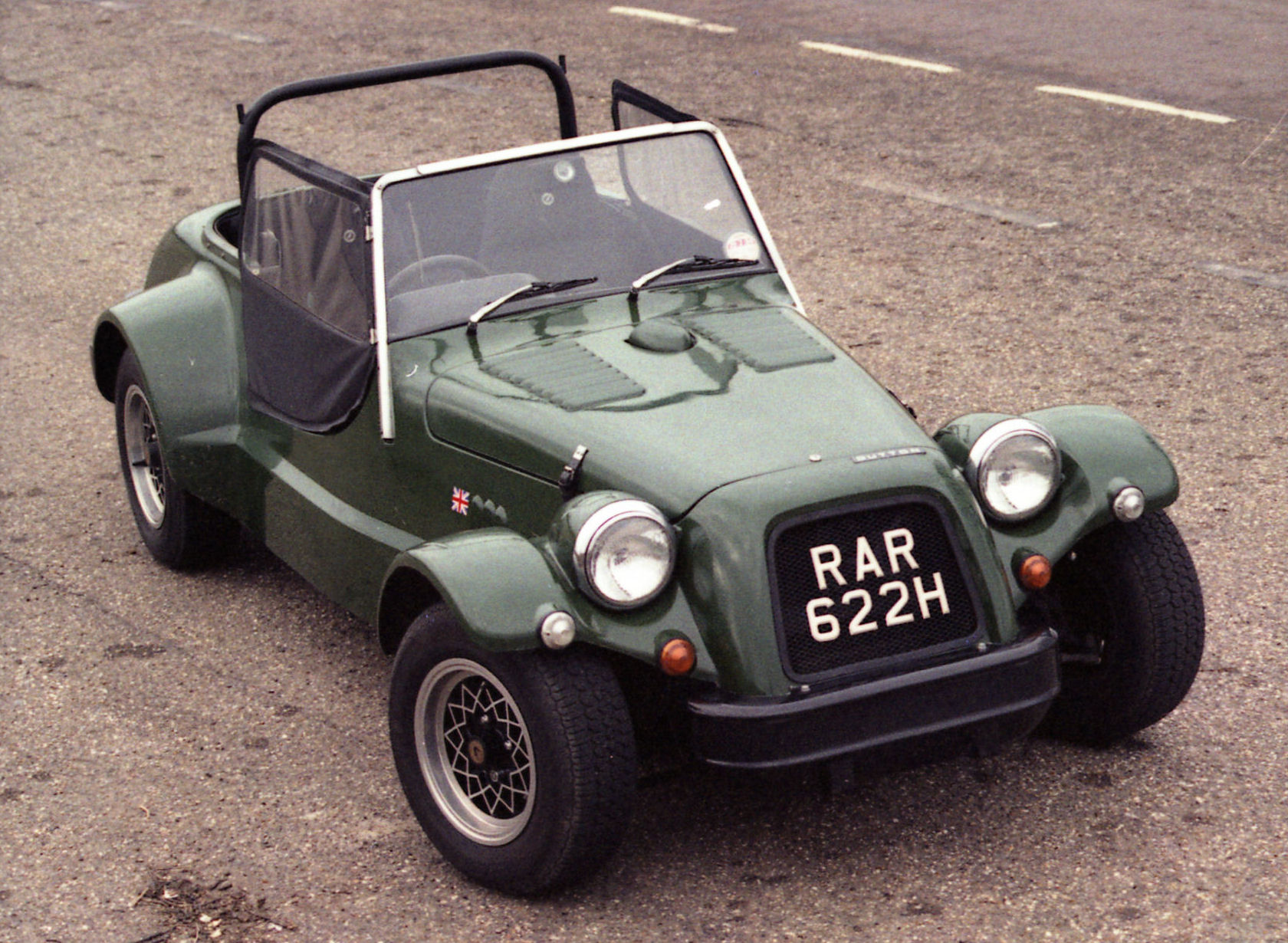 1983 Dutton Melos